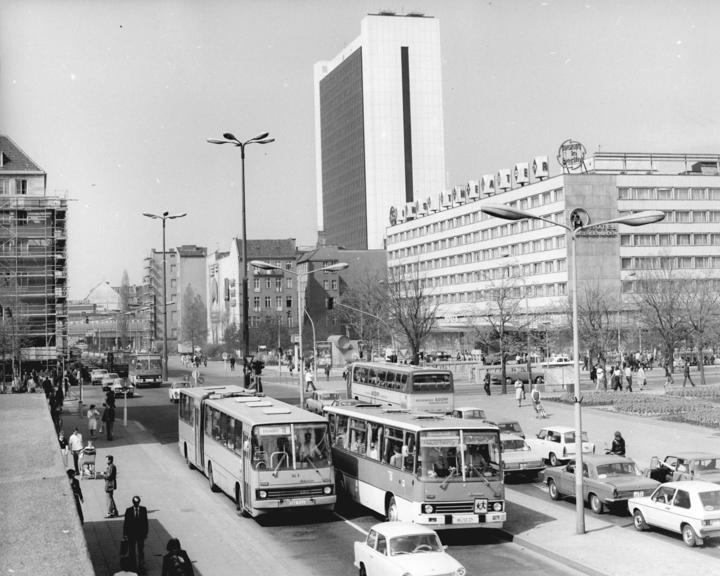 ADN-ZB Zimmermann 9.6.79-pe Berlin: Neubauten wie das Hotel Unter den Linden und das Internationale Handelszentrum (Hintergrund Mitte) bestimmen das Bild an der Friedrichstraße/Ecke Unter den Linden.